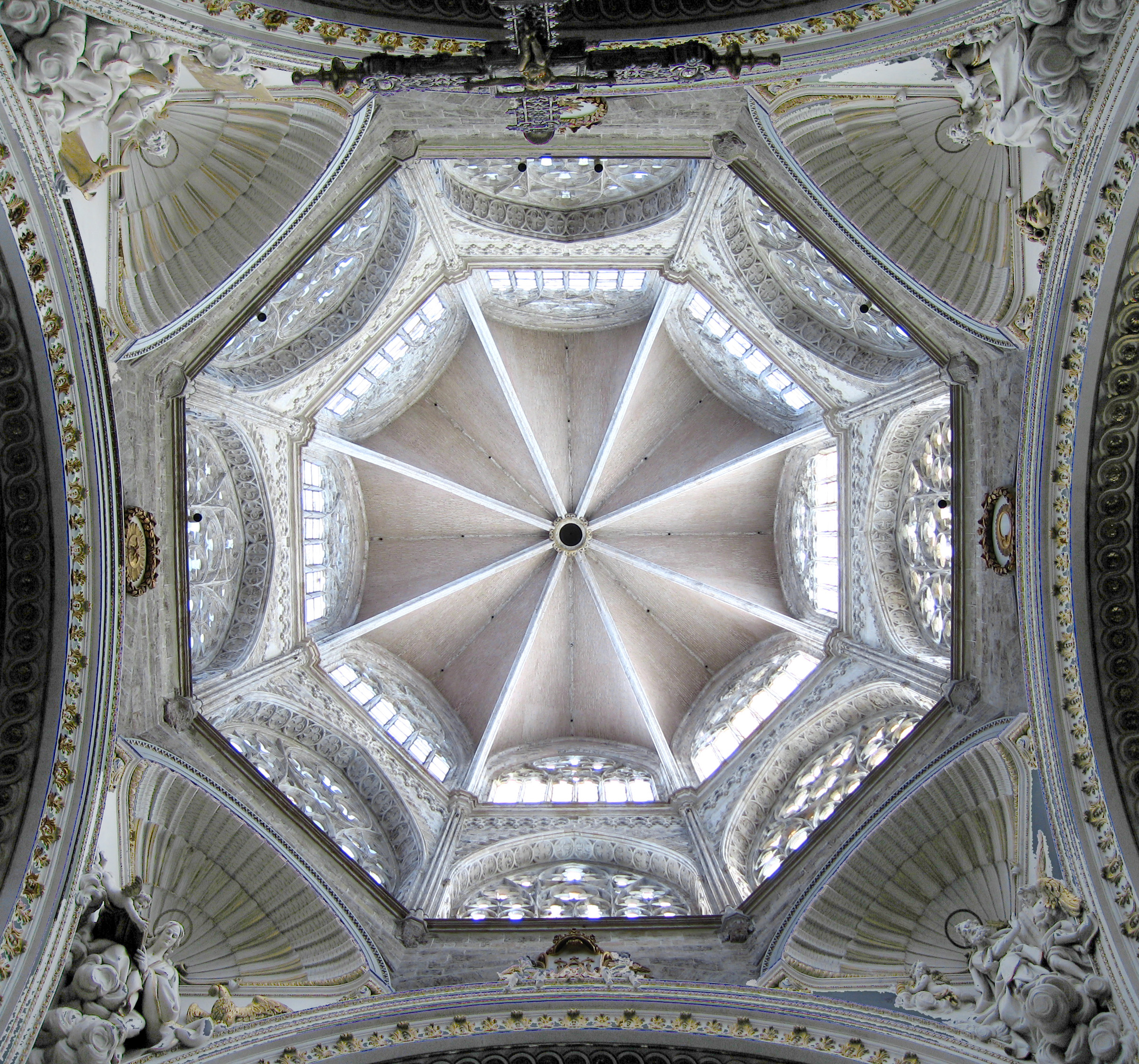 Cimbori de la seu de València